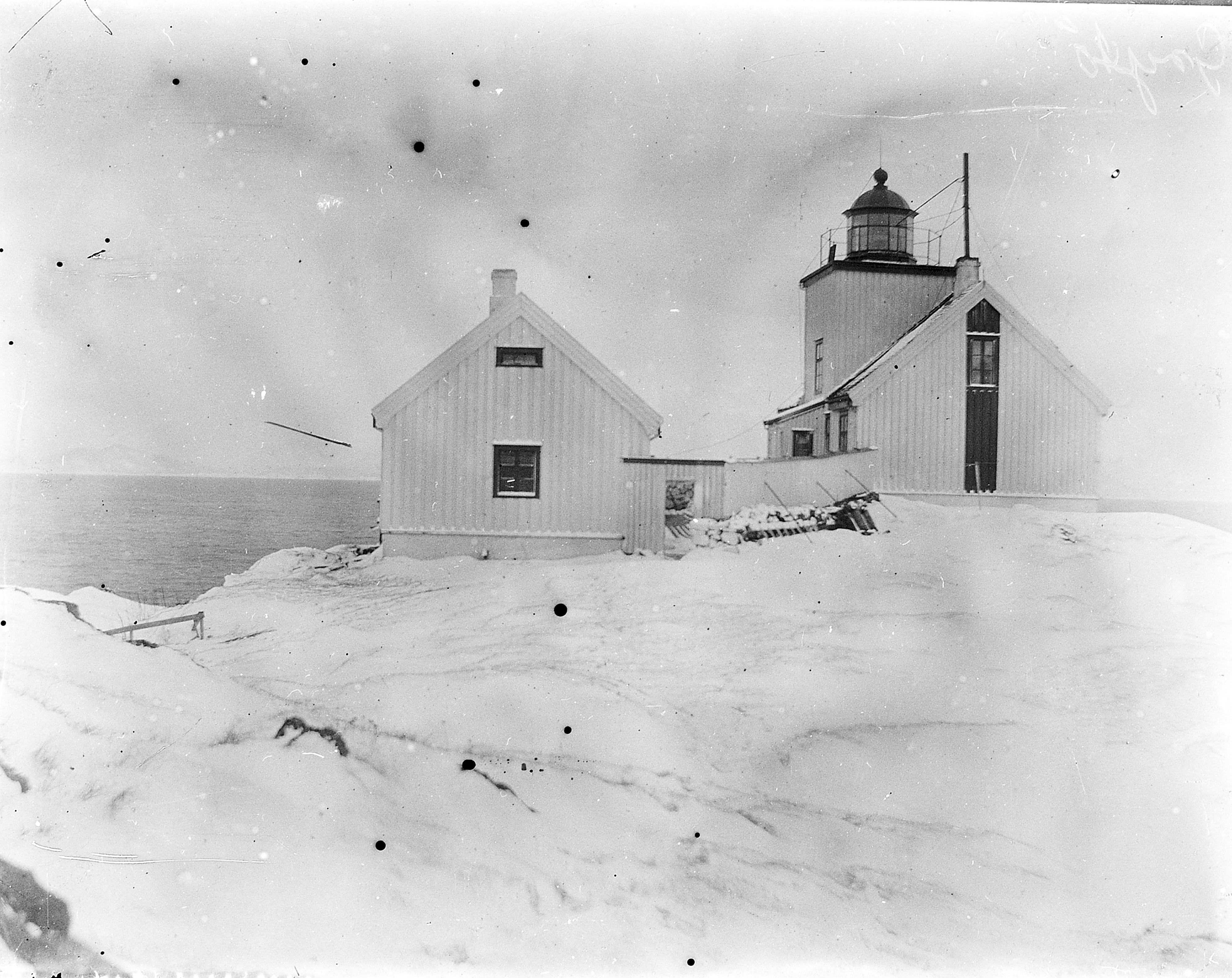 Bildet er hentet fra Arkivverket. Grytøy, Bodø Arkivinstitusjon : Riksarkivet Arkivnavn : Fyrdirektoratet Sted : Norge, Nordland, Bodø, Grytøy Emneord: Fyr, Kyst Avbildet